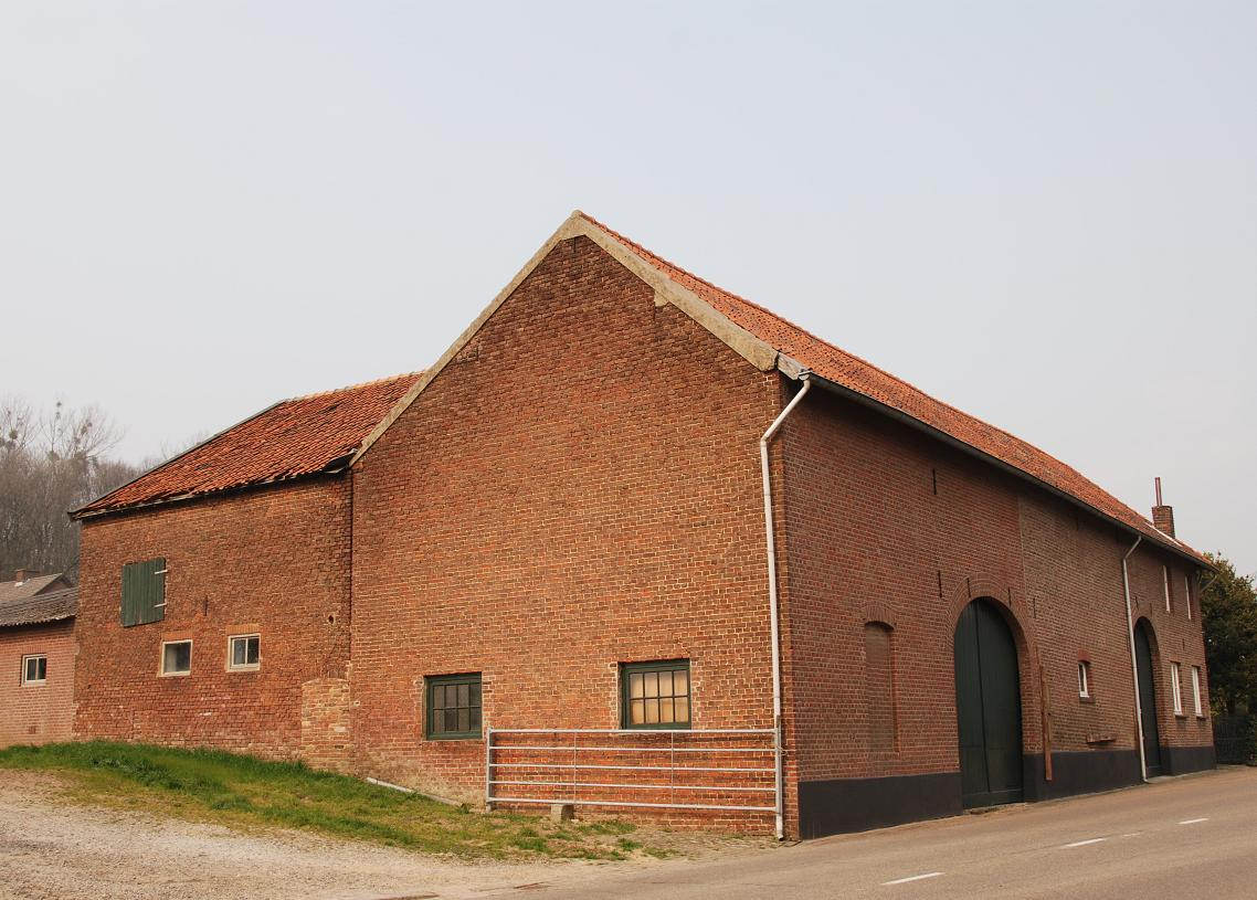 Limburgs: Boerderie in Humkove tösje Ulesjtraote en Meersje